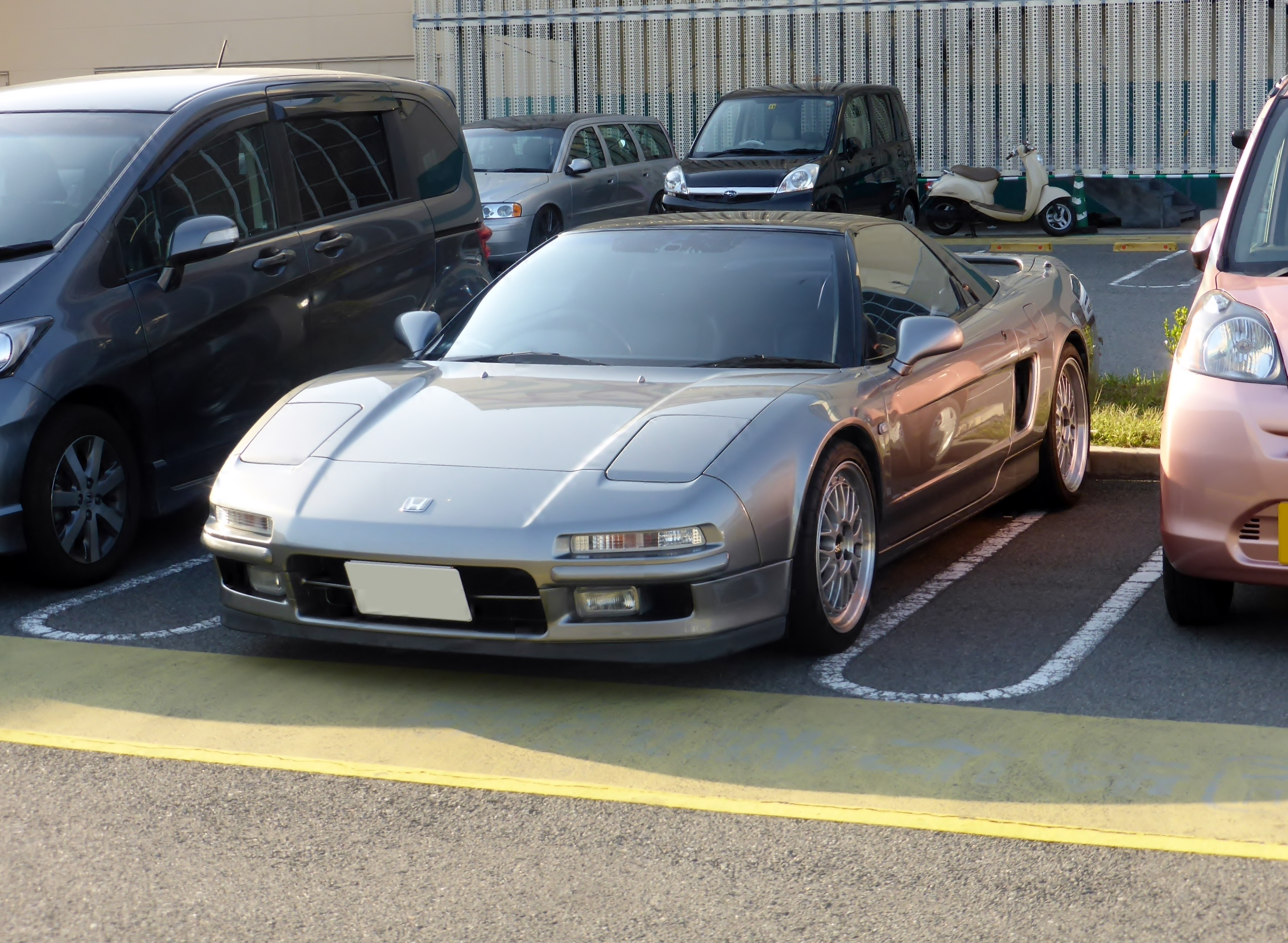 NA1型ホンダ・NSXをフロントから撮影。